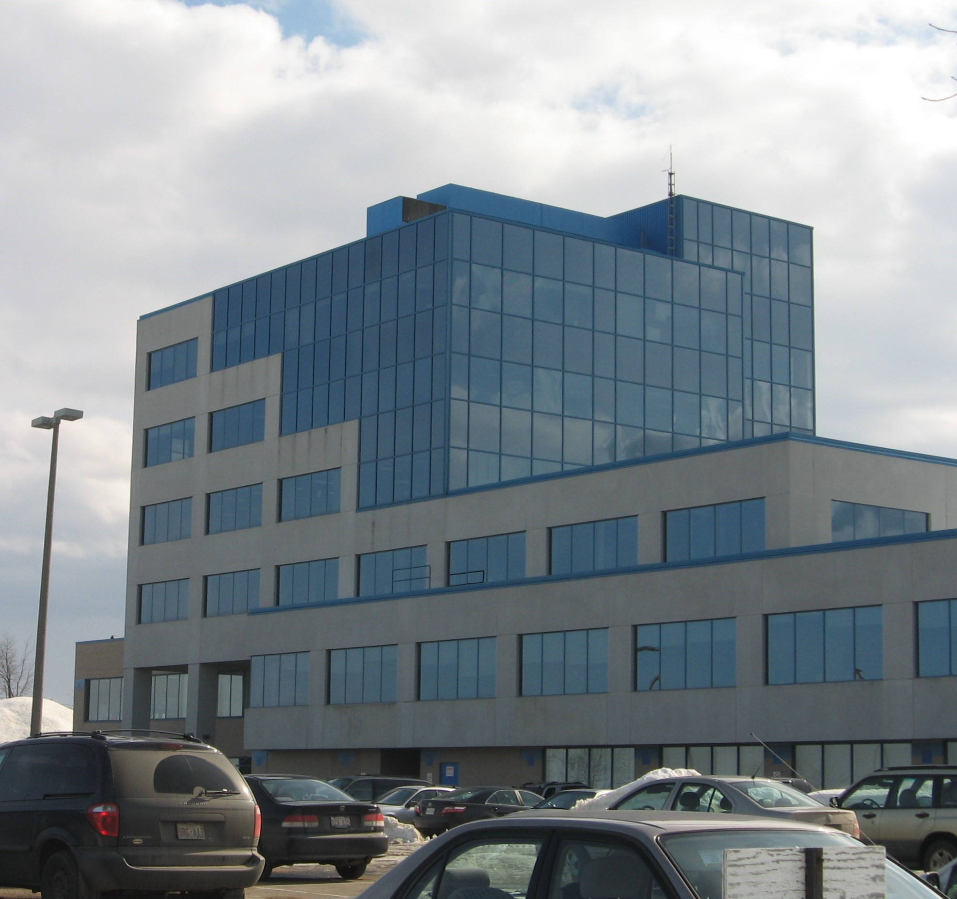 tour à bureaux du centre-ville